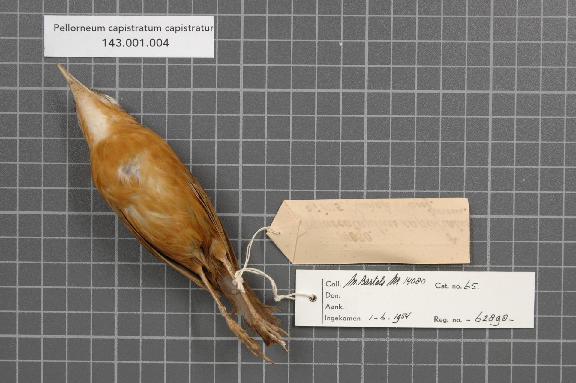 Pellorneum capistratum capistratum (Temminck, 1823)